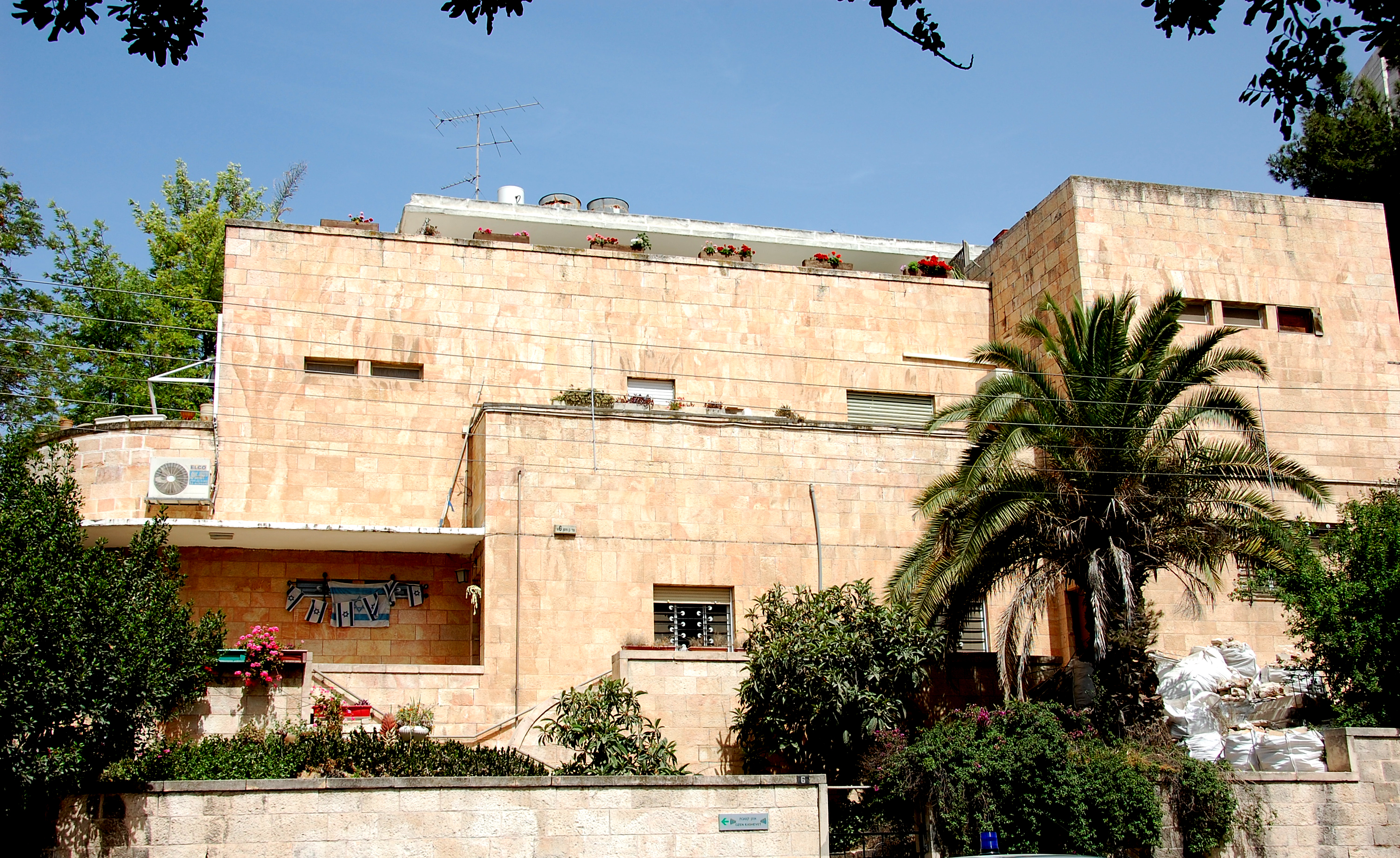 Villa Lea, rehavia, jerusalem